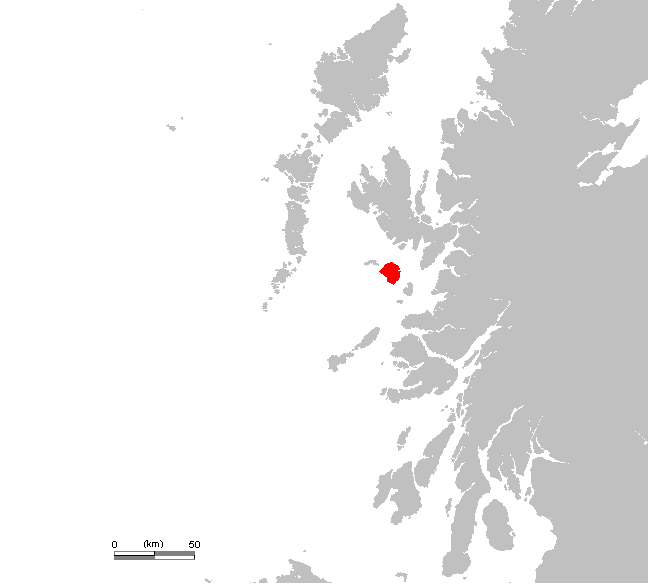 Description: Carte de l'île de Rùm en Ecosse, Royaume-Uni Auteur: Rémih